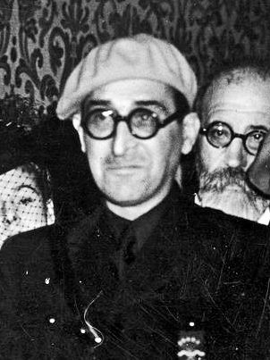 Parte de la comitiva española que asistió a la coronación del papa Pío XII. Roma, marzo de 1939. En primer plano aparecen los políticos franquistas Raimundo Fernández-Cuesta y José de Yanguas Messía, y el poeta Rafael Sánchez Mazas.